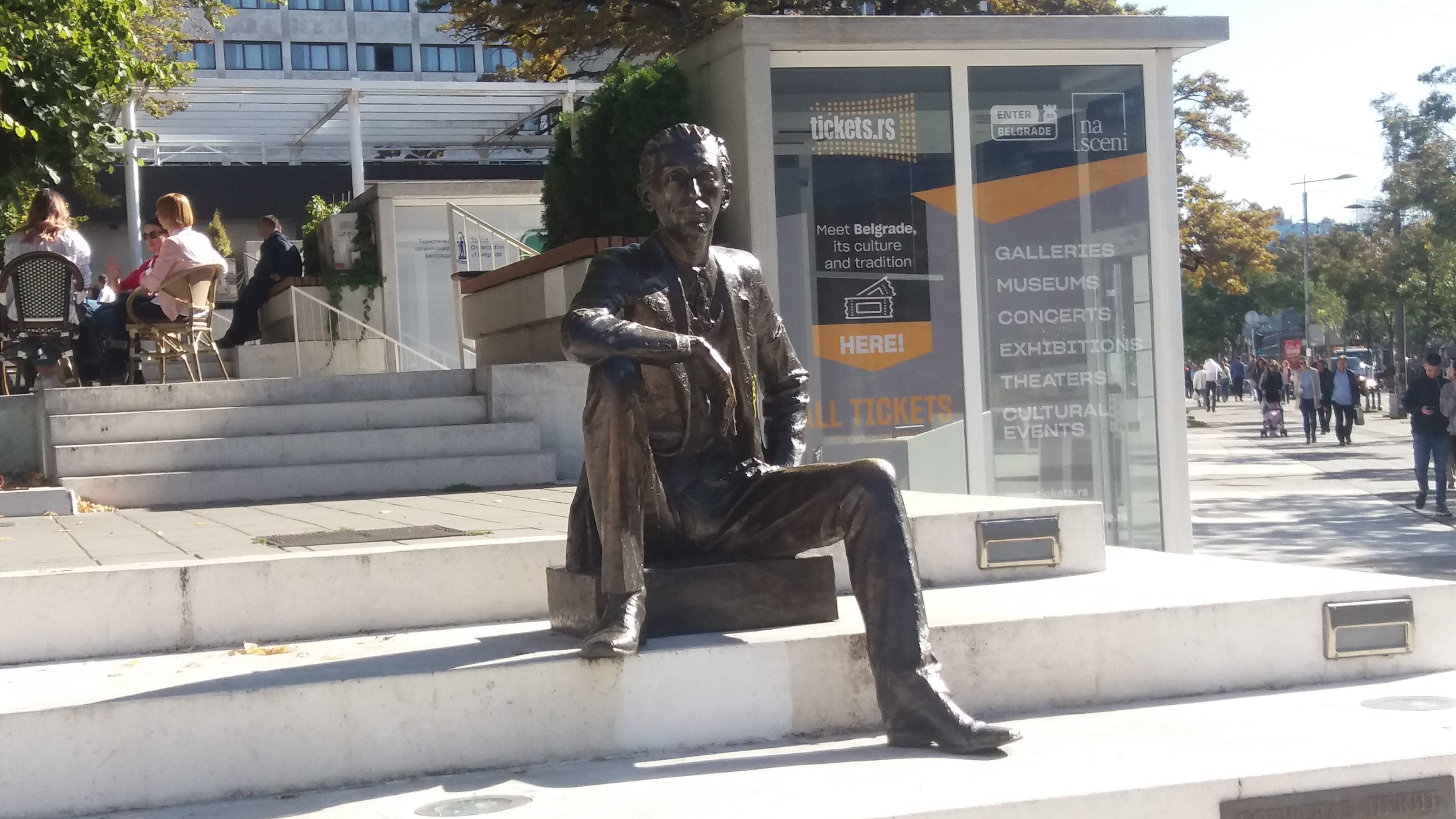 Spomenik Borislavu Pekiću u Beogradu